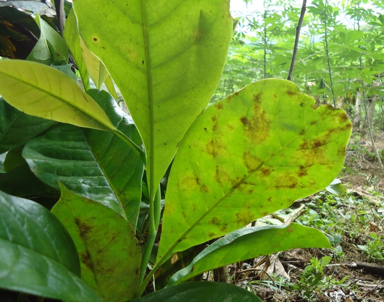 detalhe das folhas de magnolia silvioi